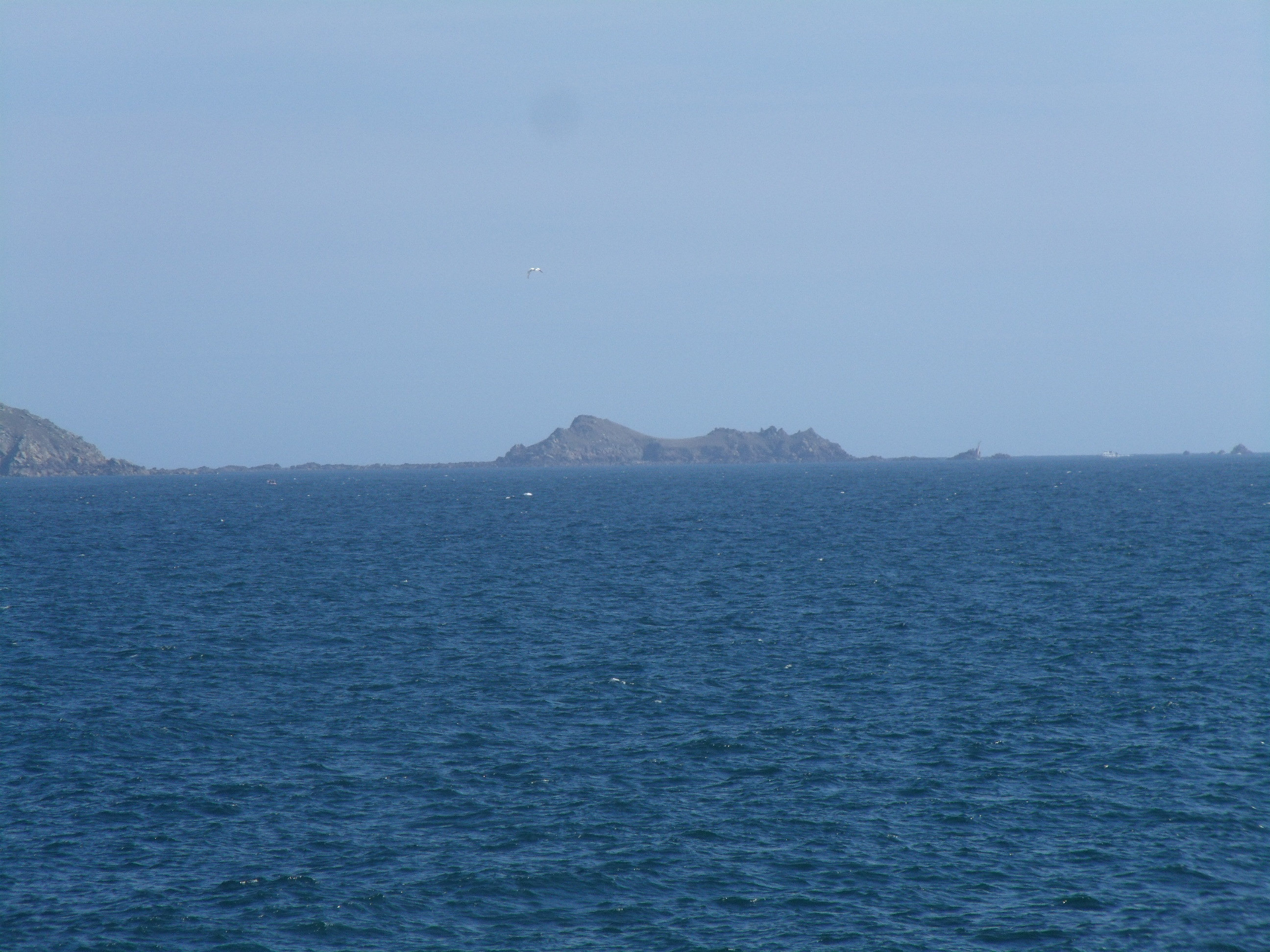 L'Île Malban sur l'archipel des Sept-Îles